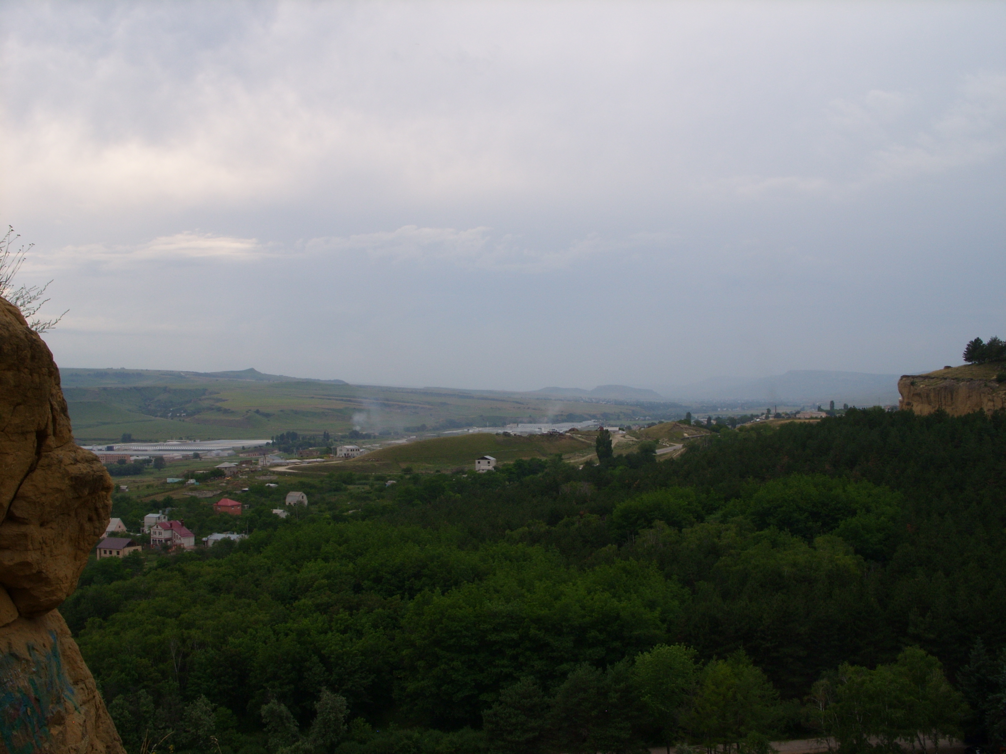 вблизи г. Кисловодска